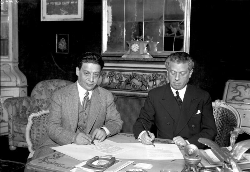 Der berühmte deutsche Theater-Regisseur Prof. Max Reinhardt unterzeichnet seinen ersten Tonfilmvertrag mit Amerika . Prof. Max Reinhardt (rechts) beim Unterzeichnen seines ersten Tonfilmvertrages mit dem amerikanischen Direktor Mr. Curtis Melnitz in Berlin.